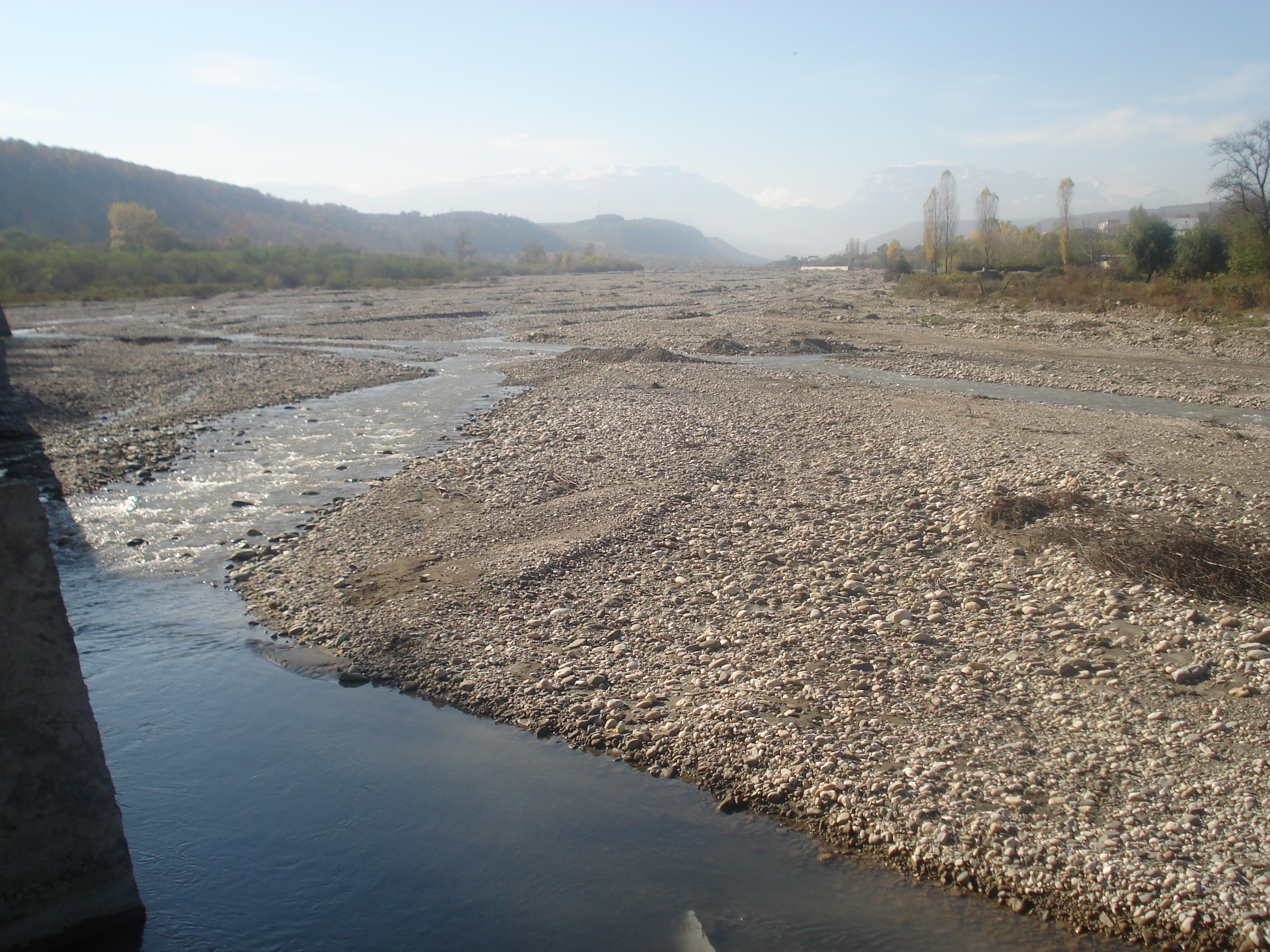 Река Кусарчай